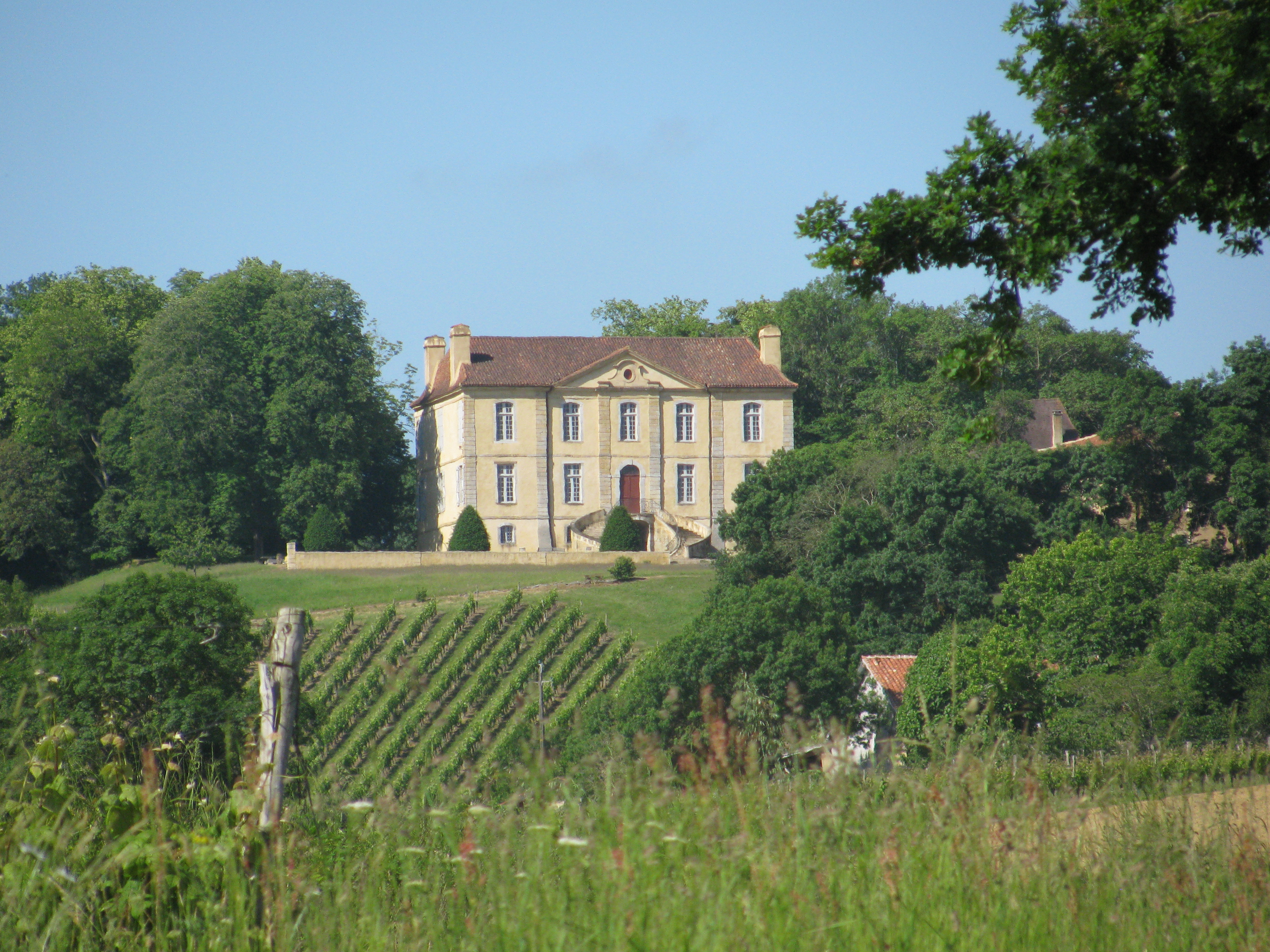 Château de Viella